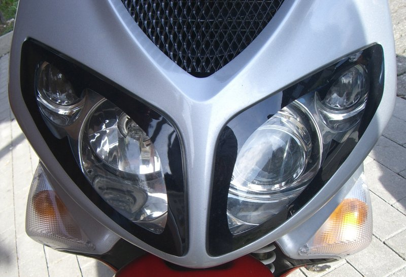 Peugeot Speedfight 2 BCD Böser Blick